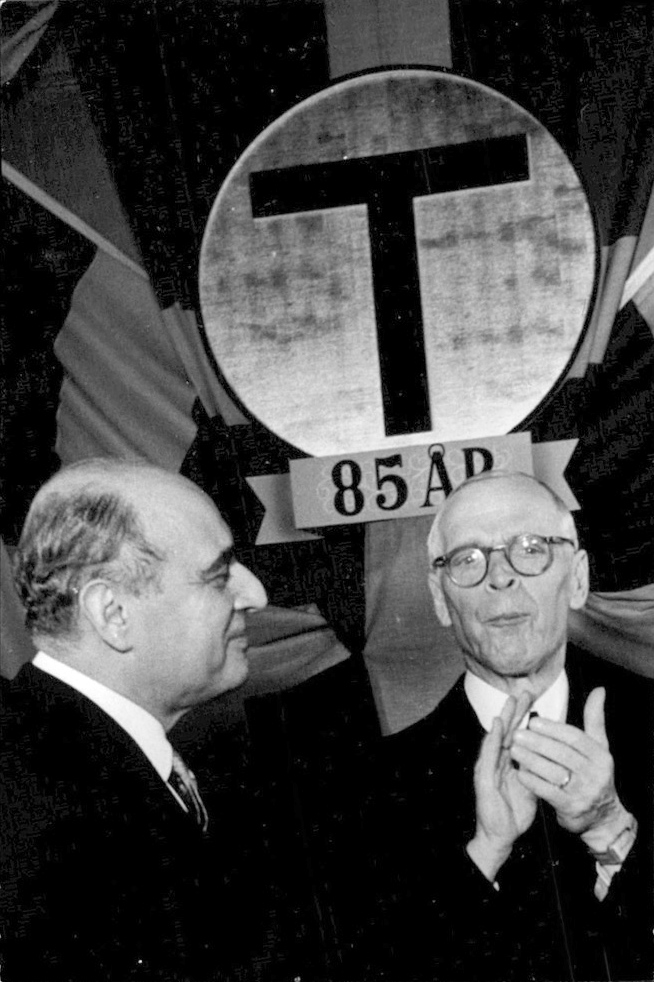 Svenska telegrambyrån har fyllt 85 år och firat högtidsdagen med utdelning av Patriotiska sällskapets guldmedalj. Därefter följde personalfest på Rosenbads Bella Venezia, varvid 49 av bolagets samtliga guldmedaljörer närvar. Bilden visar direktör Helge Hirsch och den applåderande direktör Charles Werner, styrelsens ordförande, under medaljutdelningen.